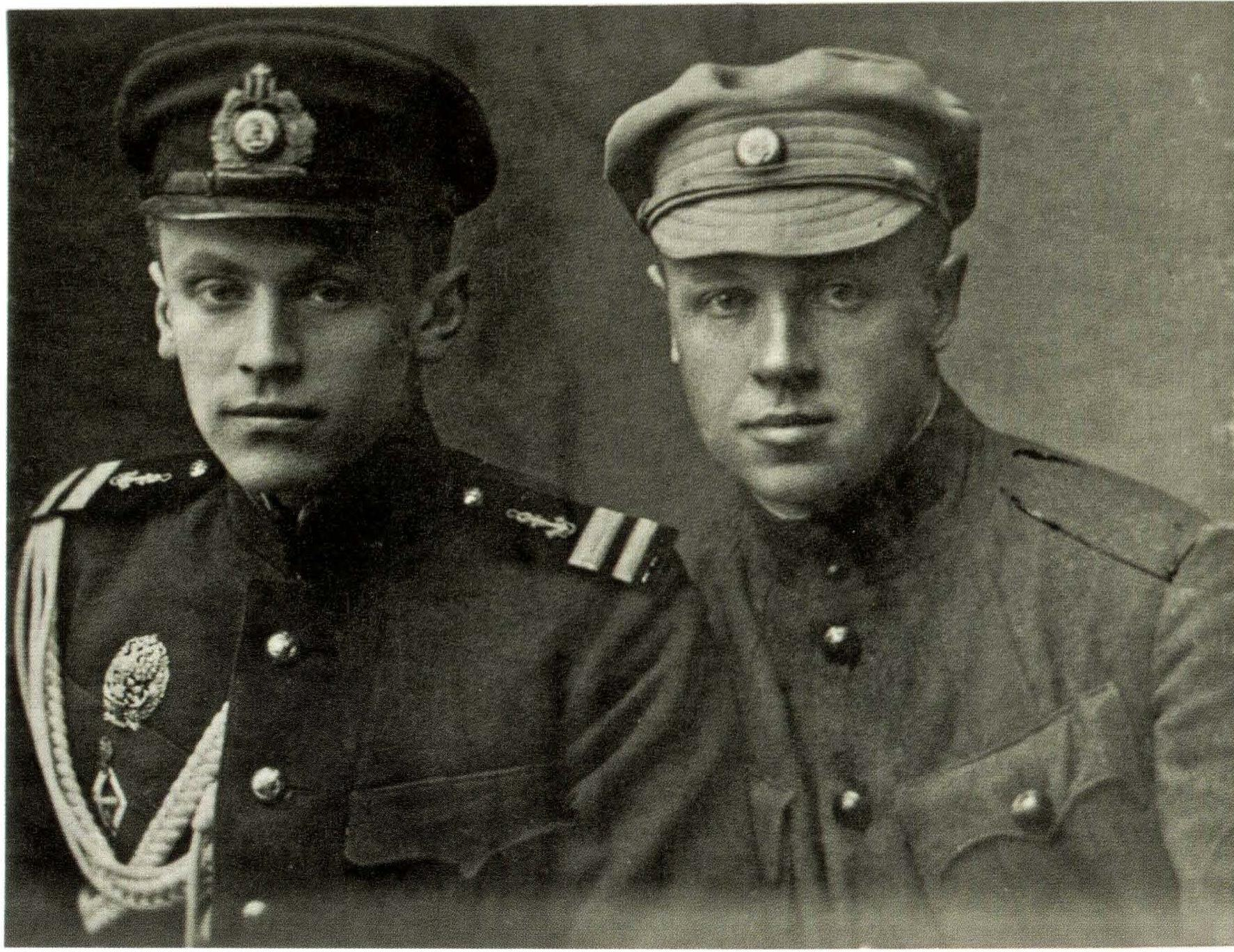 Святослав Шрамченко в униформе мичмана УДФ с одним из Сечевых Стрельцов.